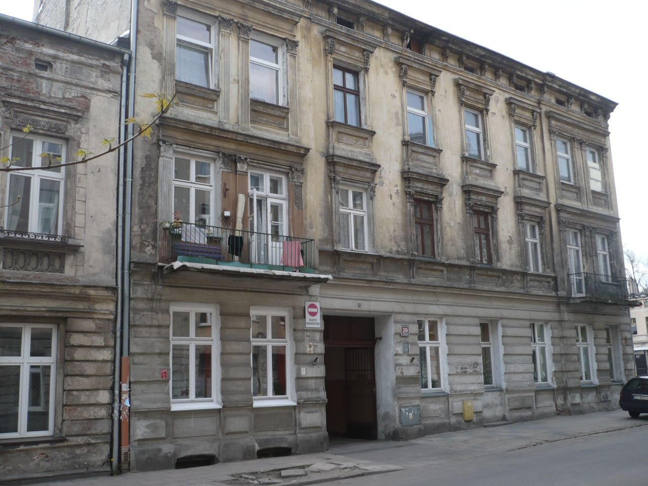 Lody, ul. Dowborczyków 29; tu, w latach ok. 1890-1903 łódzki aptekarz Maurycy Spkorny wraz z Ottonem Tinemannem prowadził wytwórnię środków opatrunkowych, pierwszą w Królestwie Polskim. Fronton.